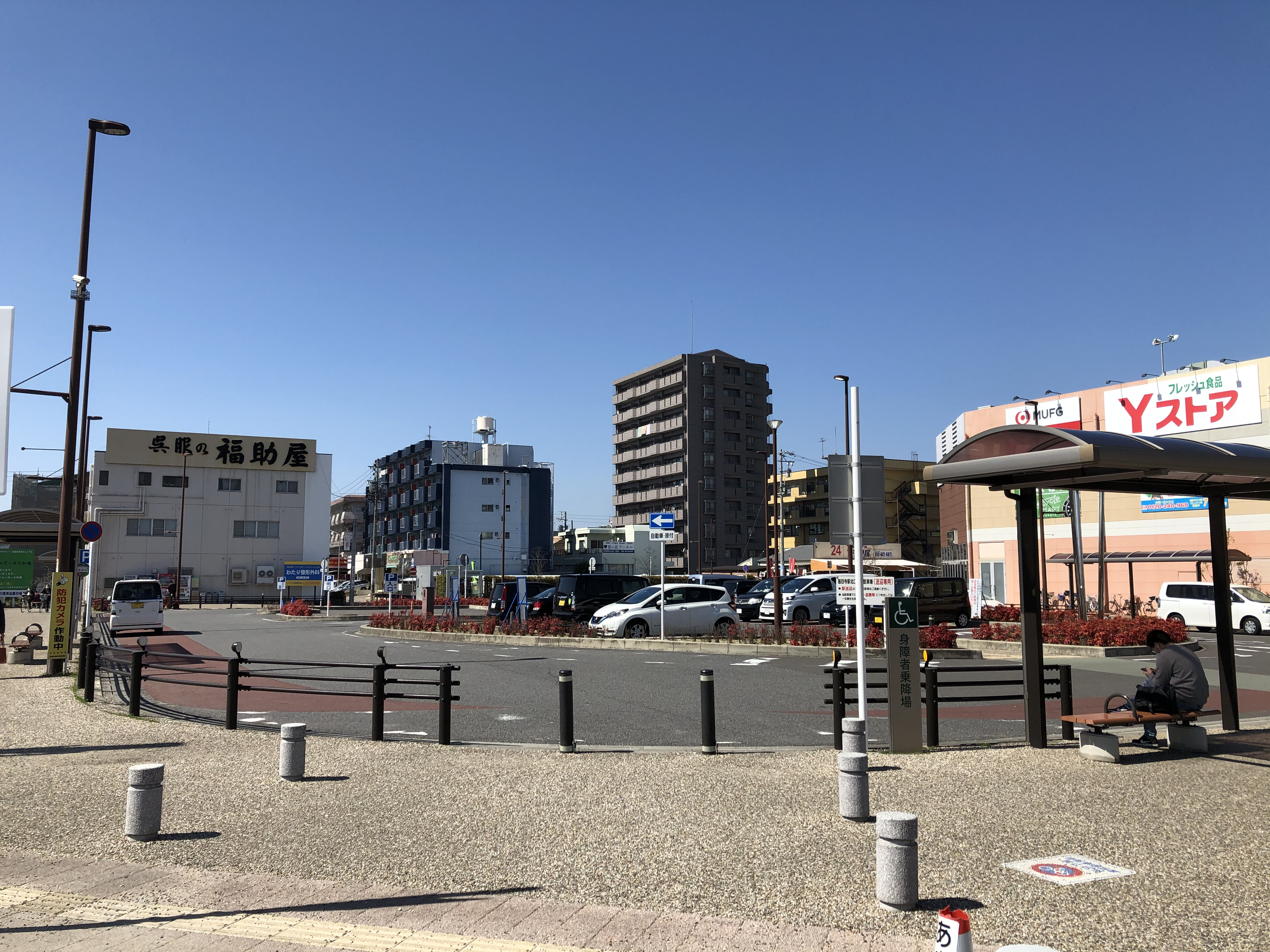 甚目寺の街並み